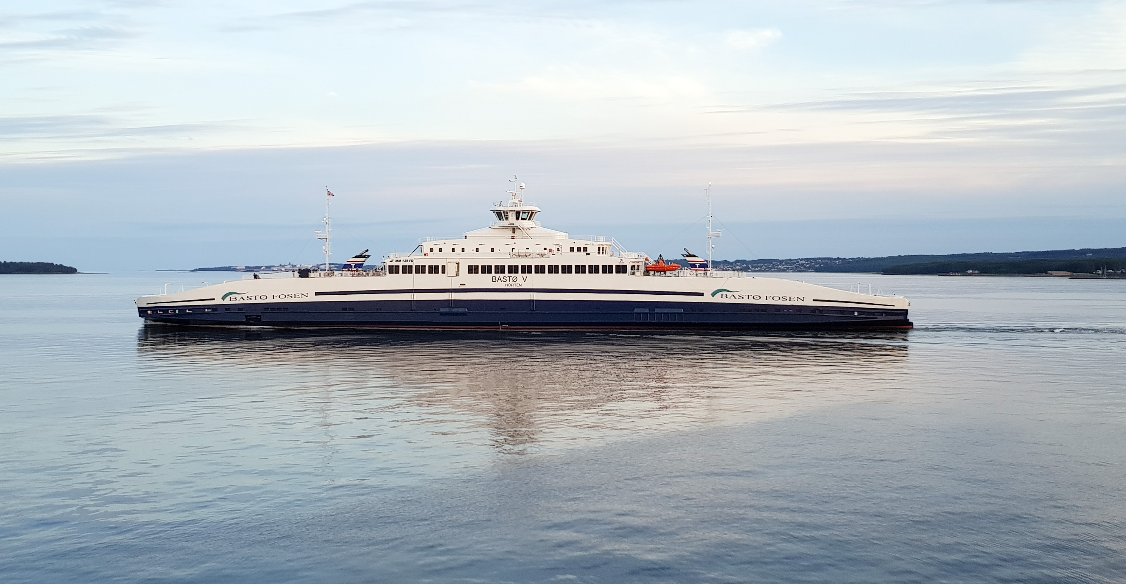 Bastø V